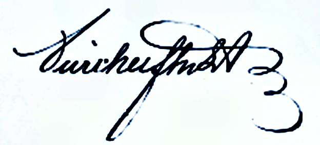 Autograph Vicenz Pürcker von Pürkhain 1872